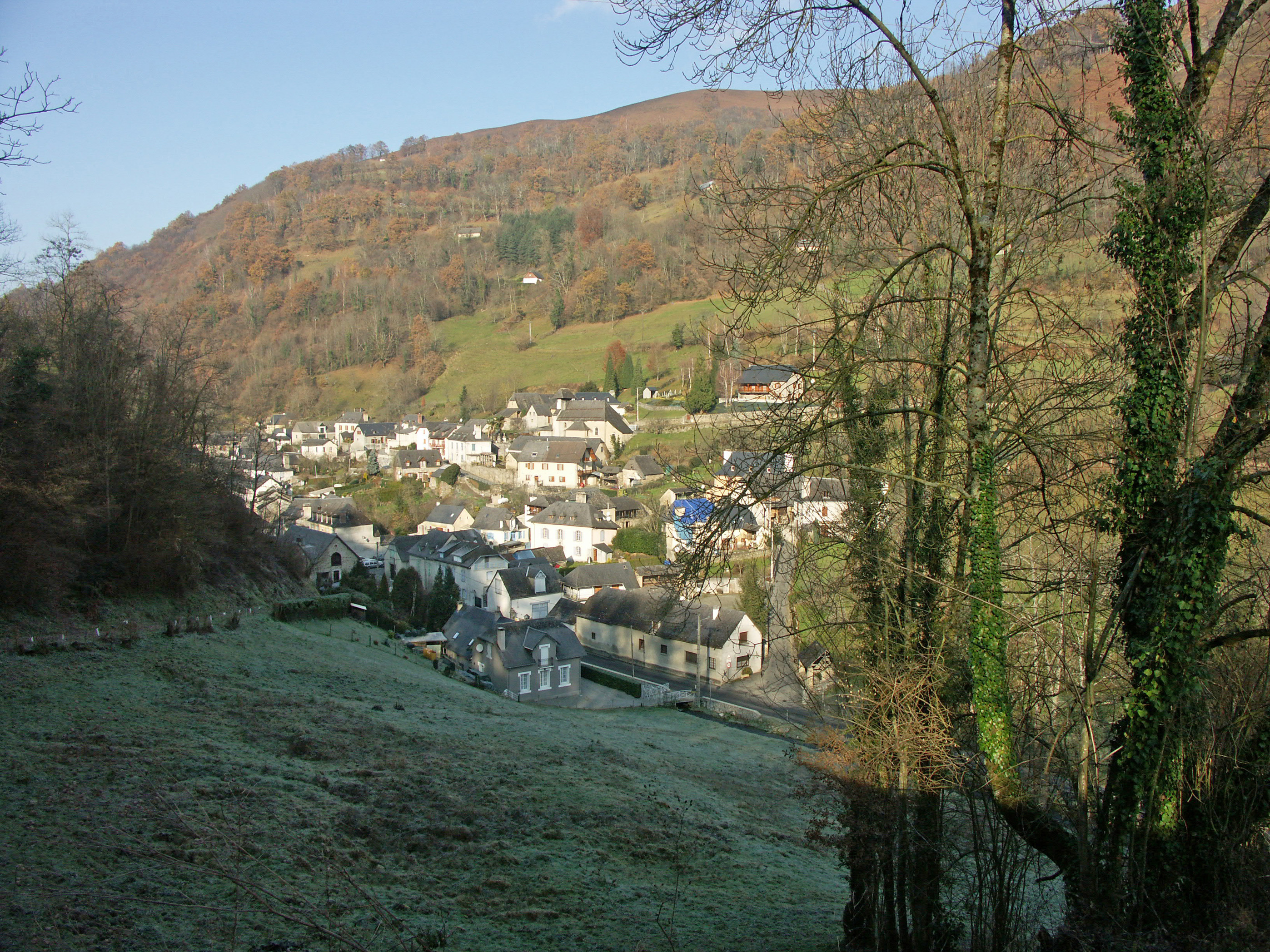 Juncalas, village de la vallée du Castelloubon dans les Hautes-Pyrénées (France).